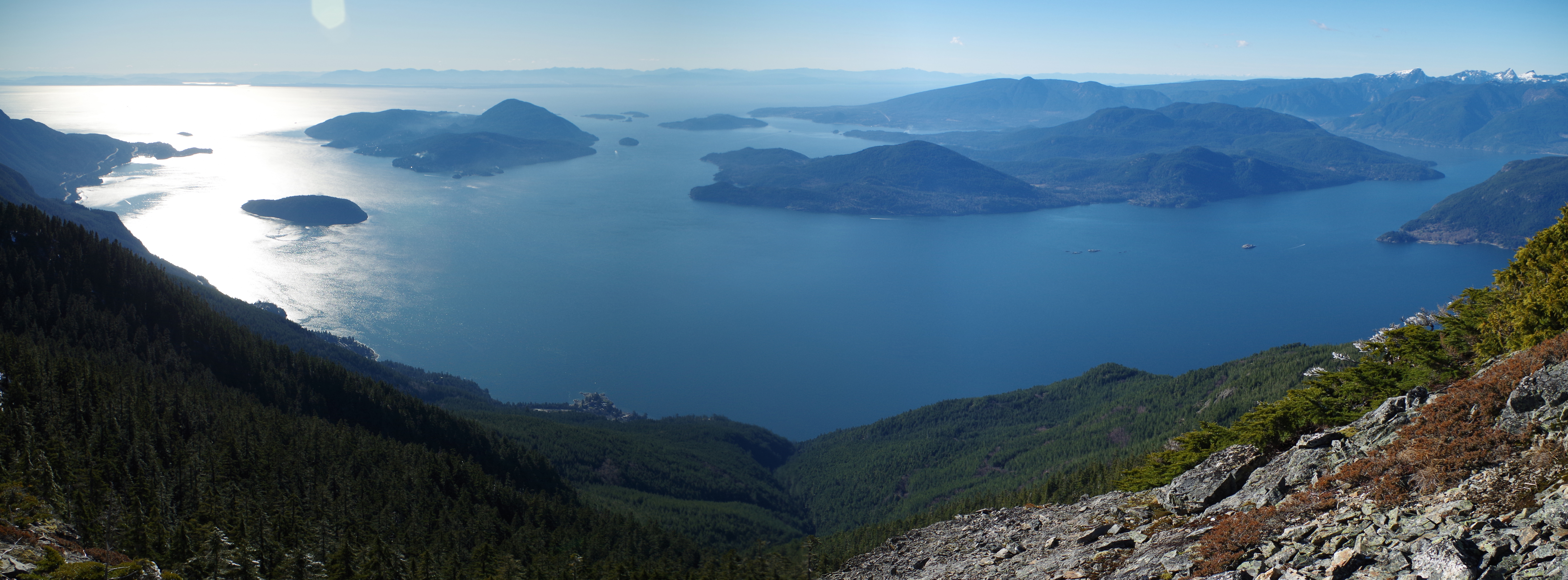 M Creek and the Howe Sound